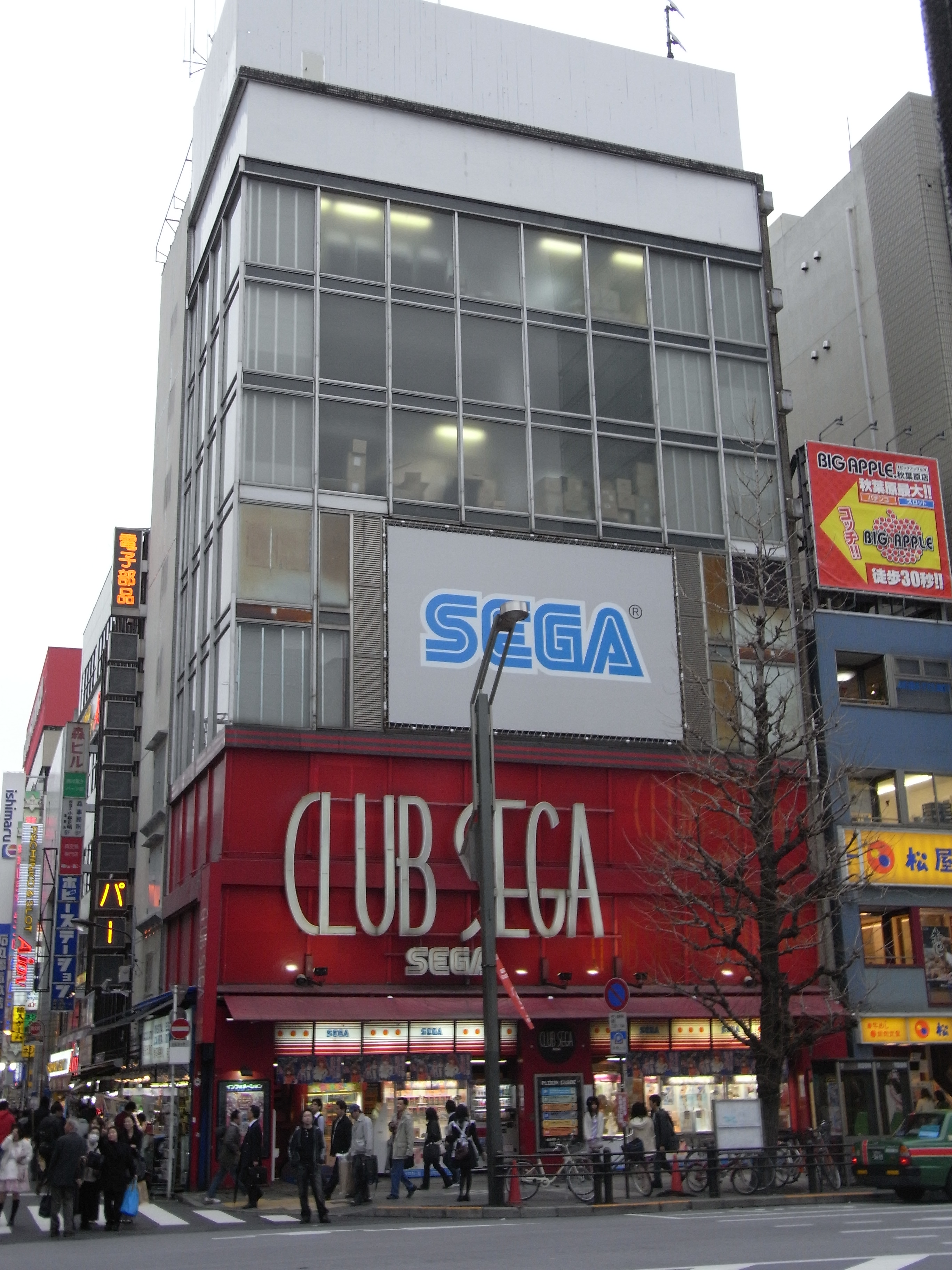 "CLUB SEGA Akihabara" Video arcade in Akihabara